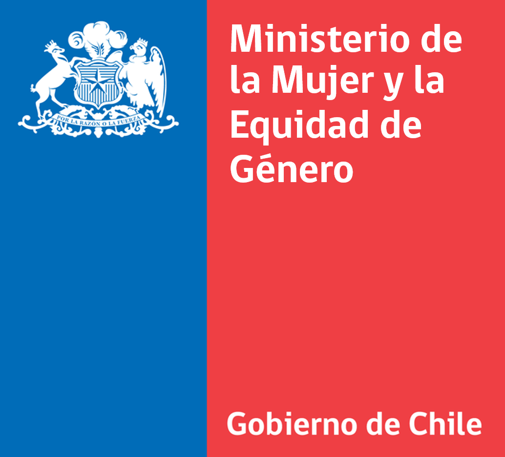 Logo del Ministerio de la Mujer y Equidad de Género.